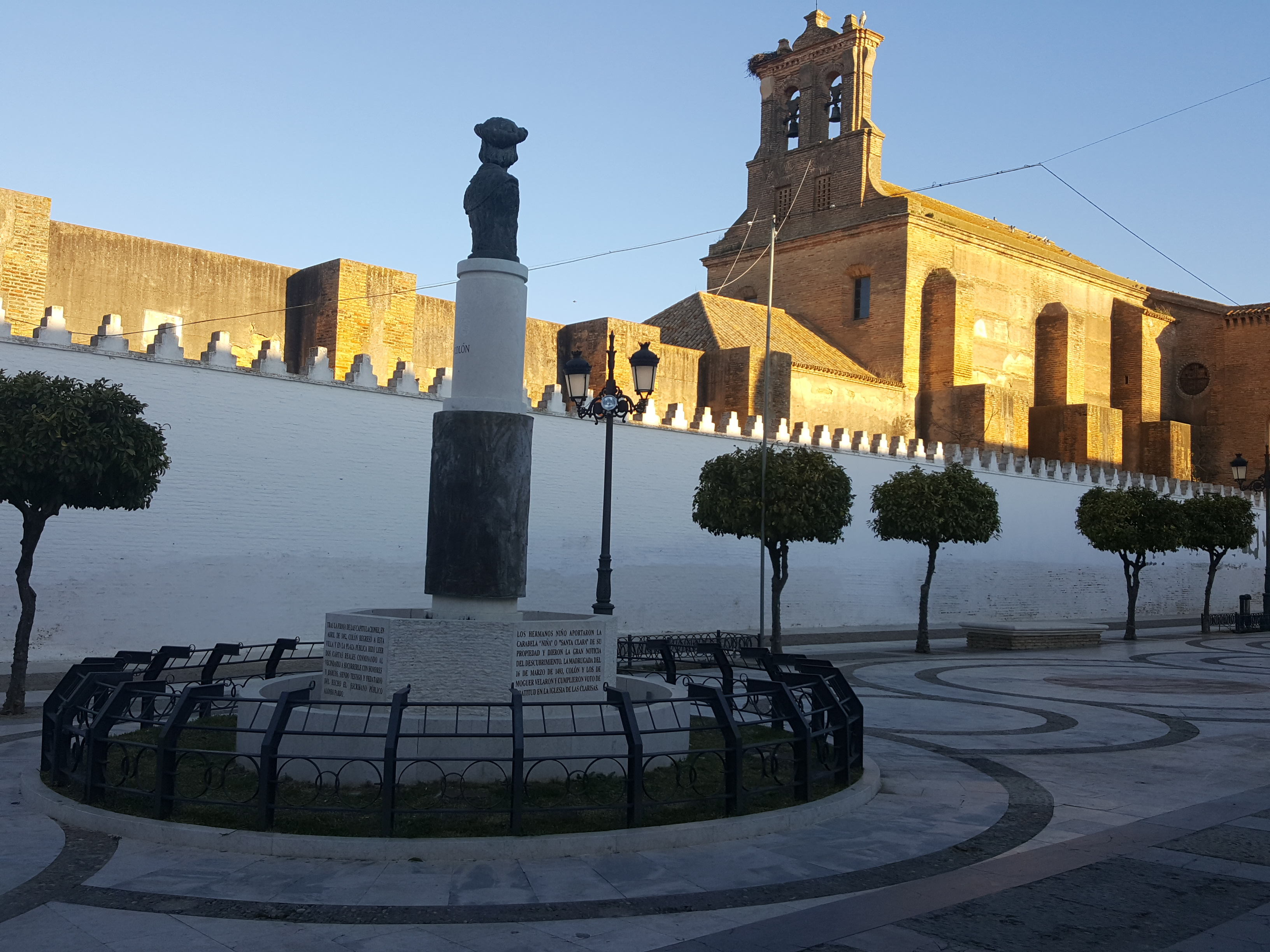 Monumento a Cristóbal Colón en Moguer Andalucía (España). Entorno del monumento.